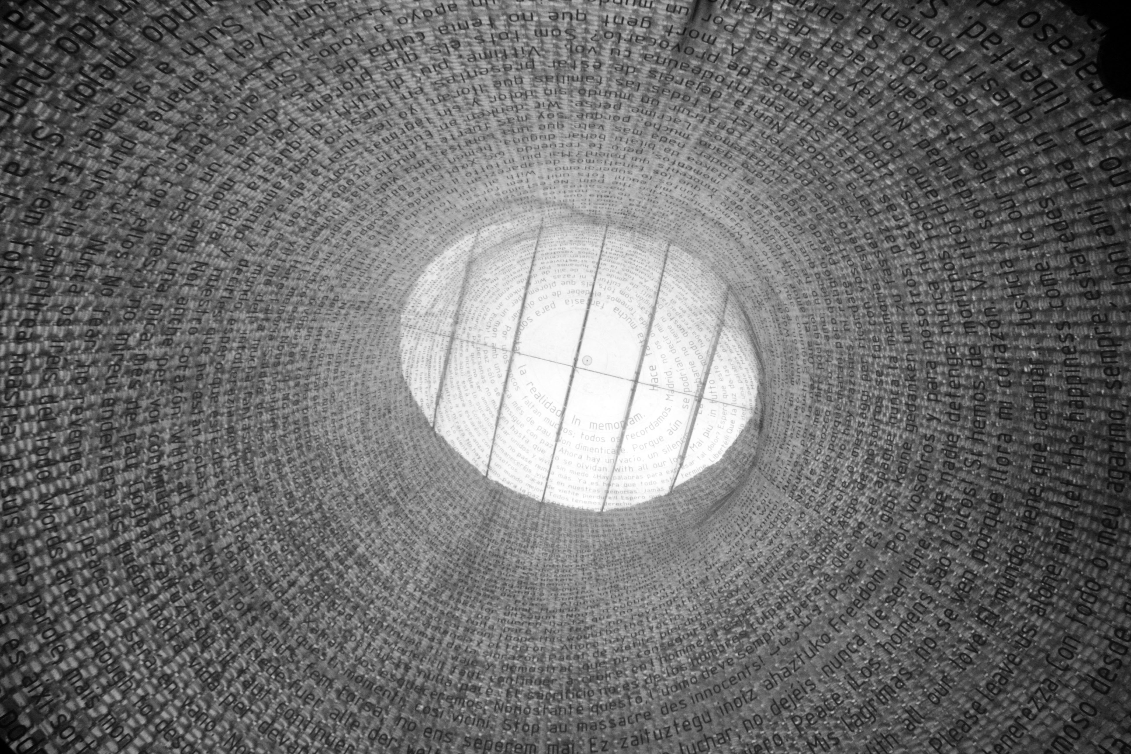 Interior del Monumento a las Víctimas de los atentados del 11 de marzo de 2004 en Madrid (España).